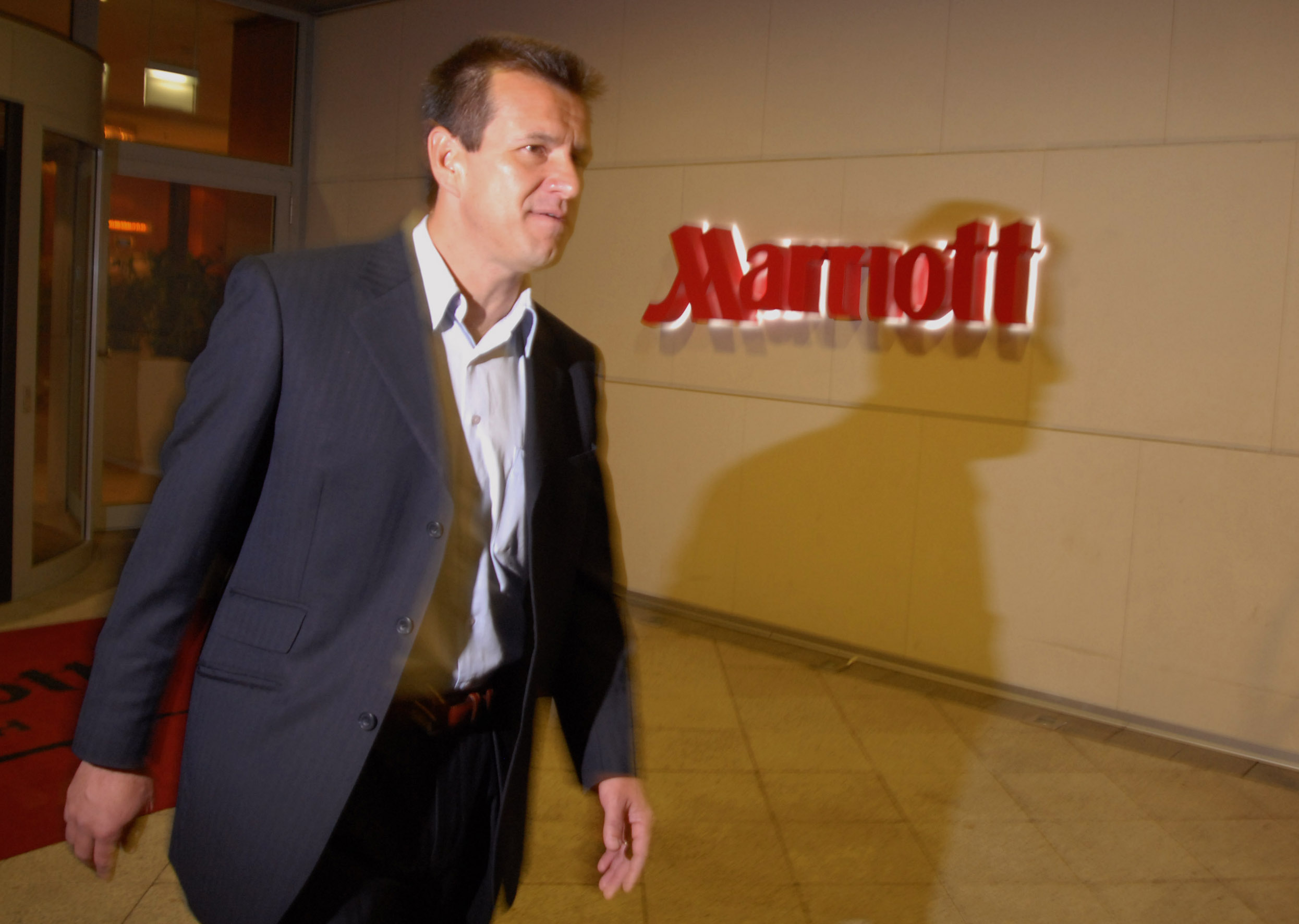 Zurique (Suíça) - O técnico da Seleção Brasileira de Futebol, Dunga, fala à imprensa na entrada do Hotel Marriott. Ele está na cidade suíça para a cerimônia em que será confirmado se o Brasil sediará a Copa do Mundo de 2014.